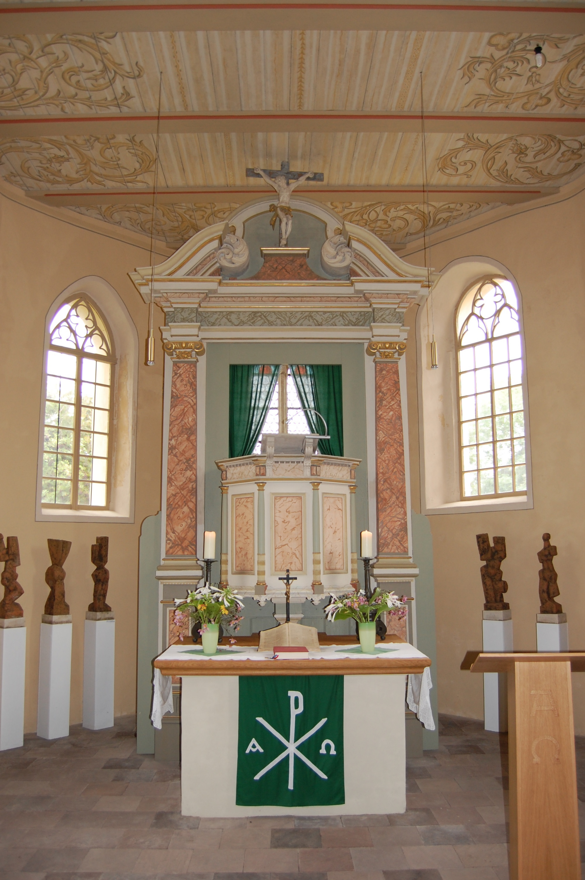 Altar in der Sankt-Egidius-Kirche in Sohlen